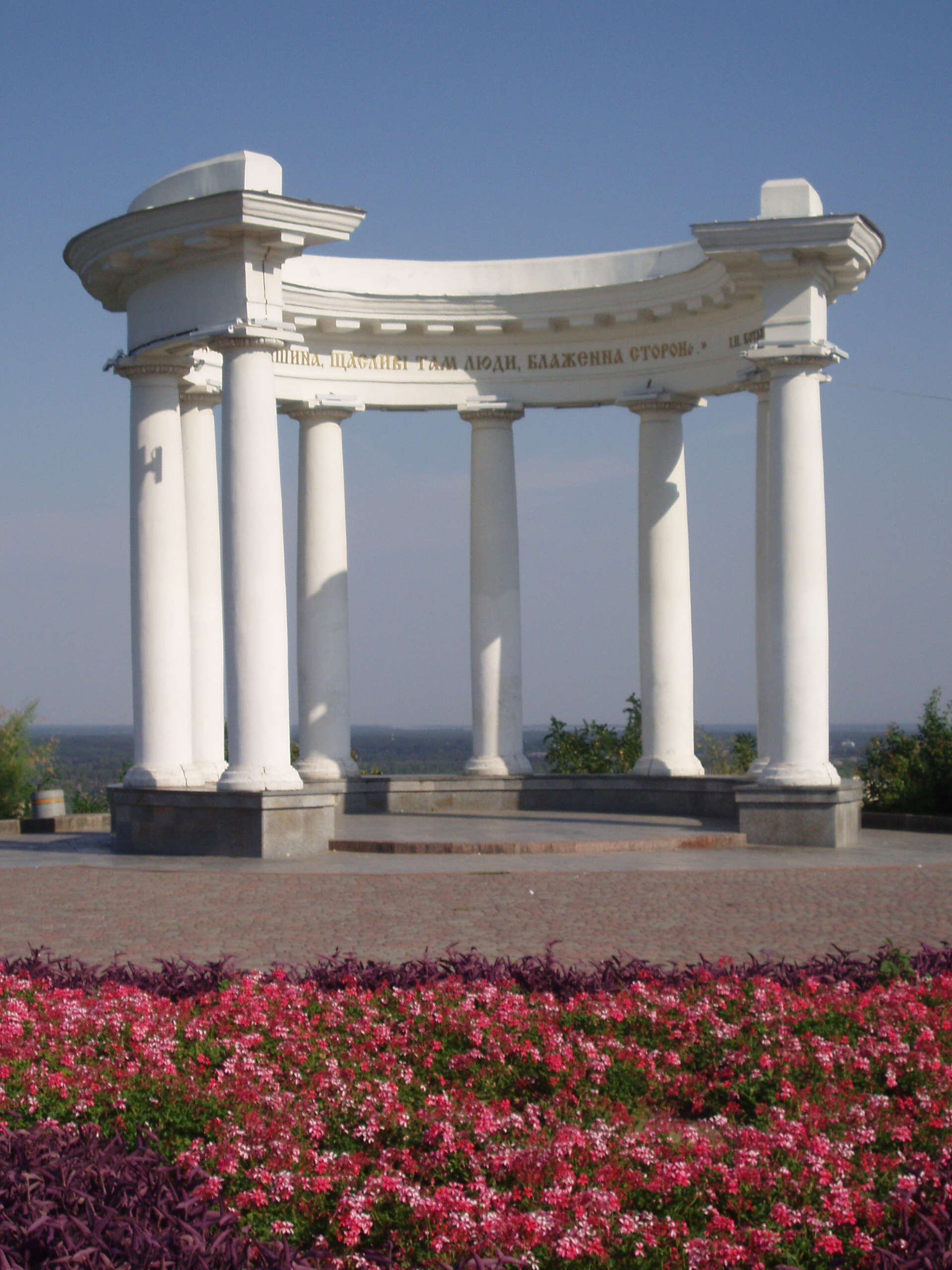 Біла альтанка (кол. альтанка дружби українців з росіянами) - один із сучасних символів українського міста Полтава.